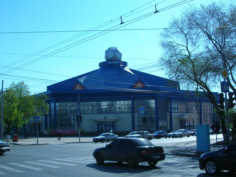 La cirko en Tjumeno (Rusio) Тюменский цирк